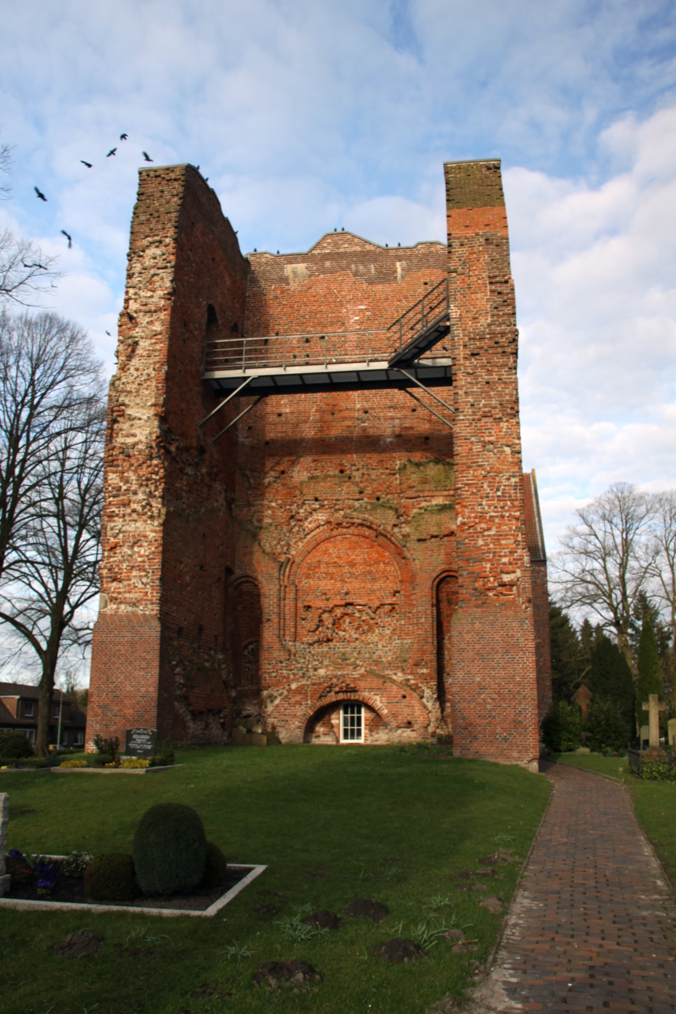 Ruine Kirchturm Reepsholt